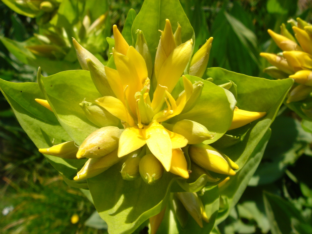 Gentiana lutea close-up